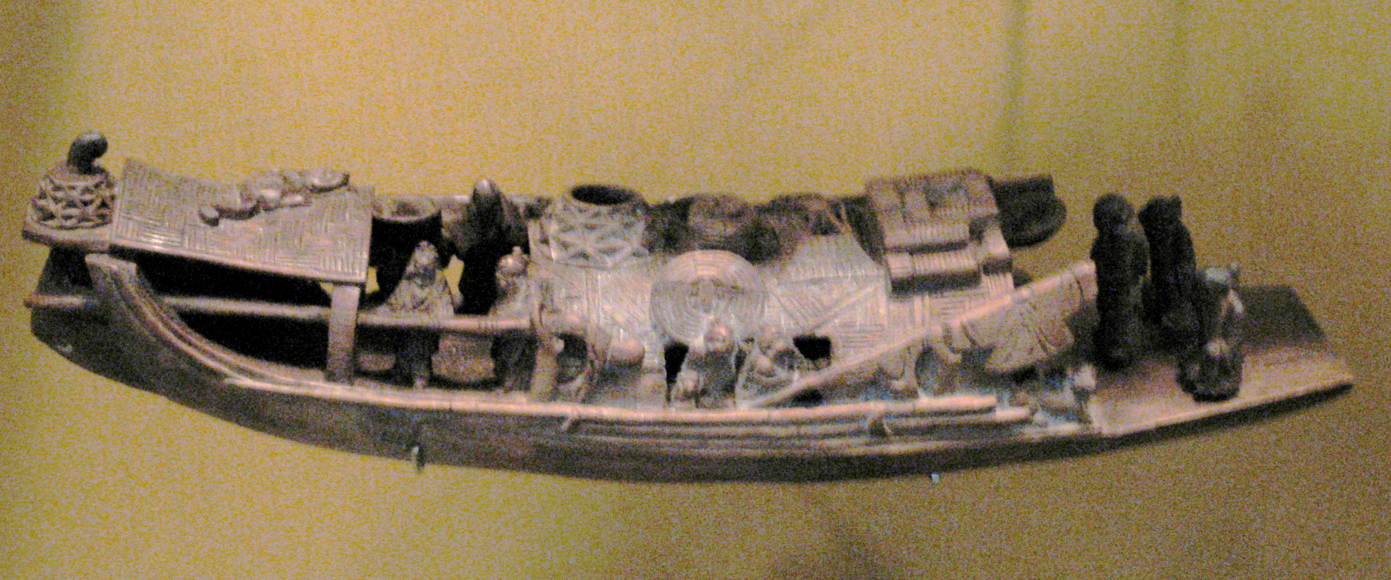 Wooden boat (sampan) model, Qing dynasty, China